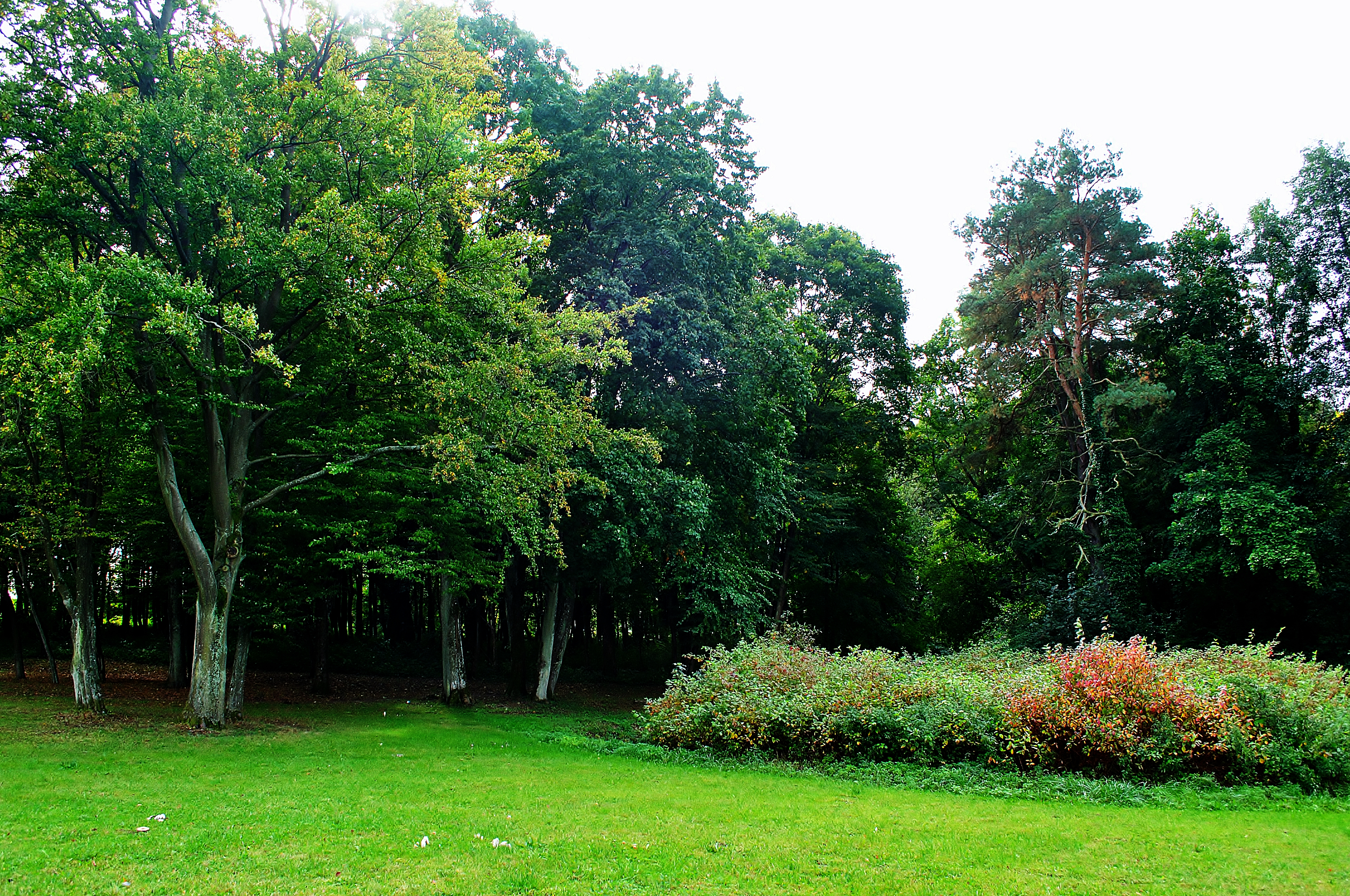 Tychowo - park dworski, 2 poł. XVIII, XIX